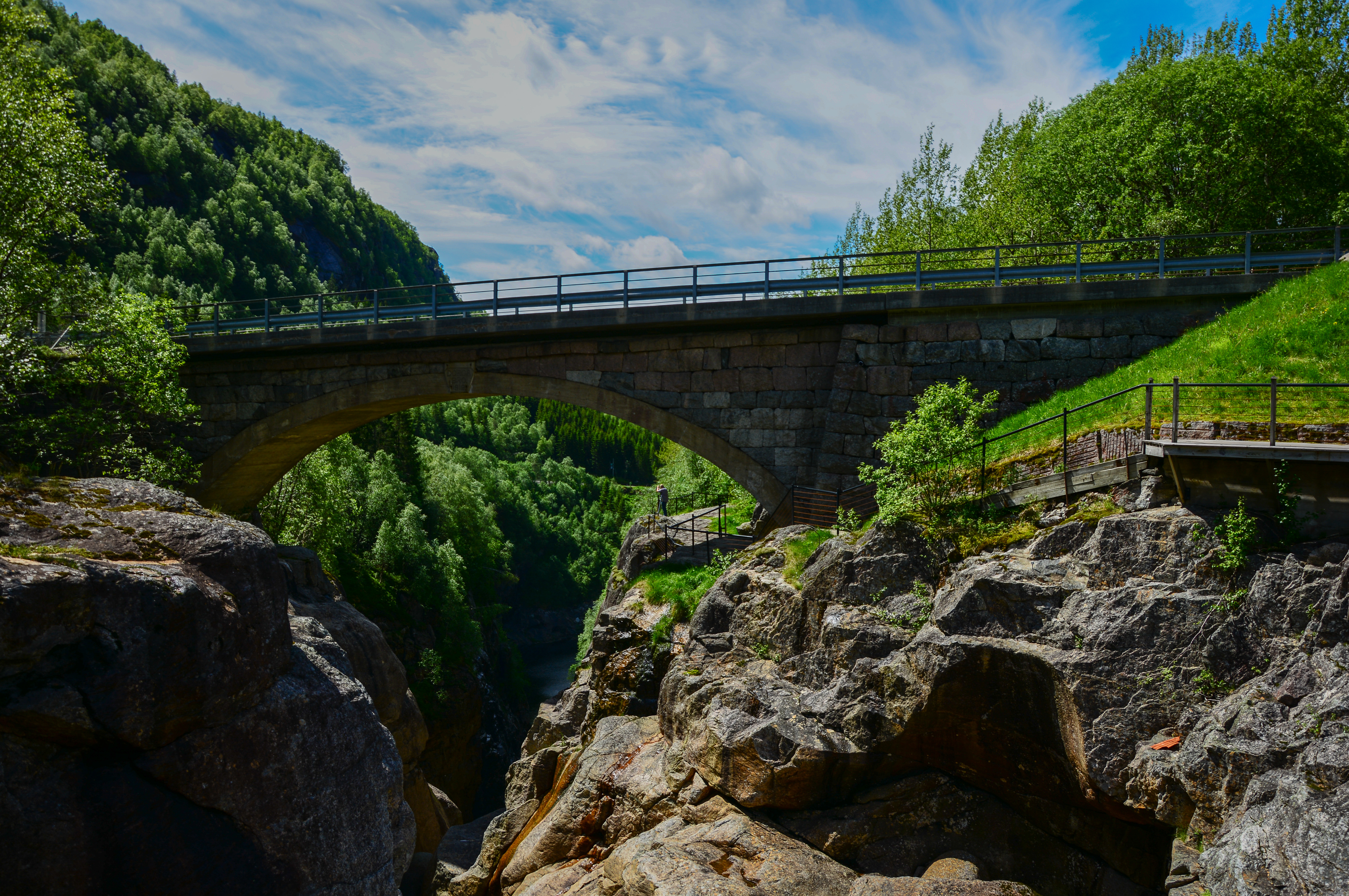 Dorga bro over Dorgefossen i elva Sira i Sirdal 14. juni 2017.